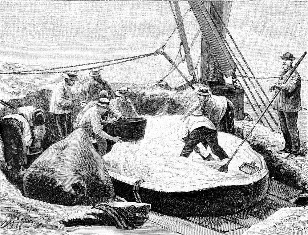 Le "junk" a été laissé de coté (à gauche au premier plan) pendant que les hommes puisent le spermaceti dans le tissu adipeux de la partie supérieure de la tête, amenée à terre par les grues dont on voit le pied.